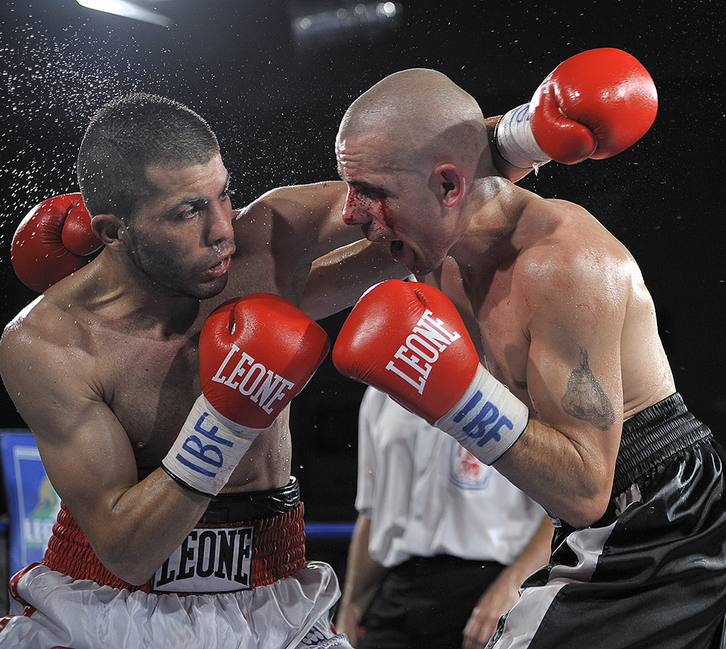 Boxe - Titolo Mediterraneo Ibf - Cecina 22/07/2011 - Pagliara Campione